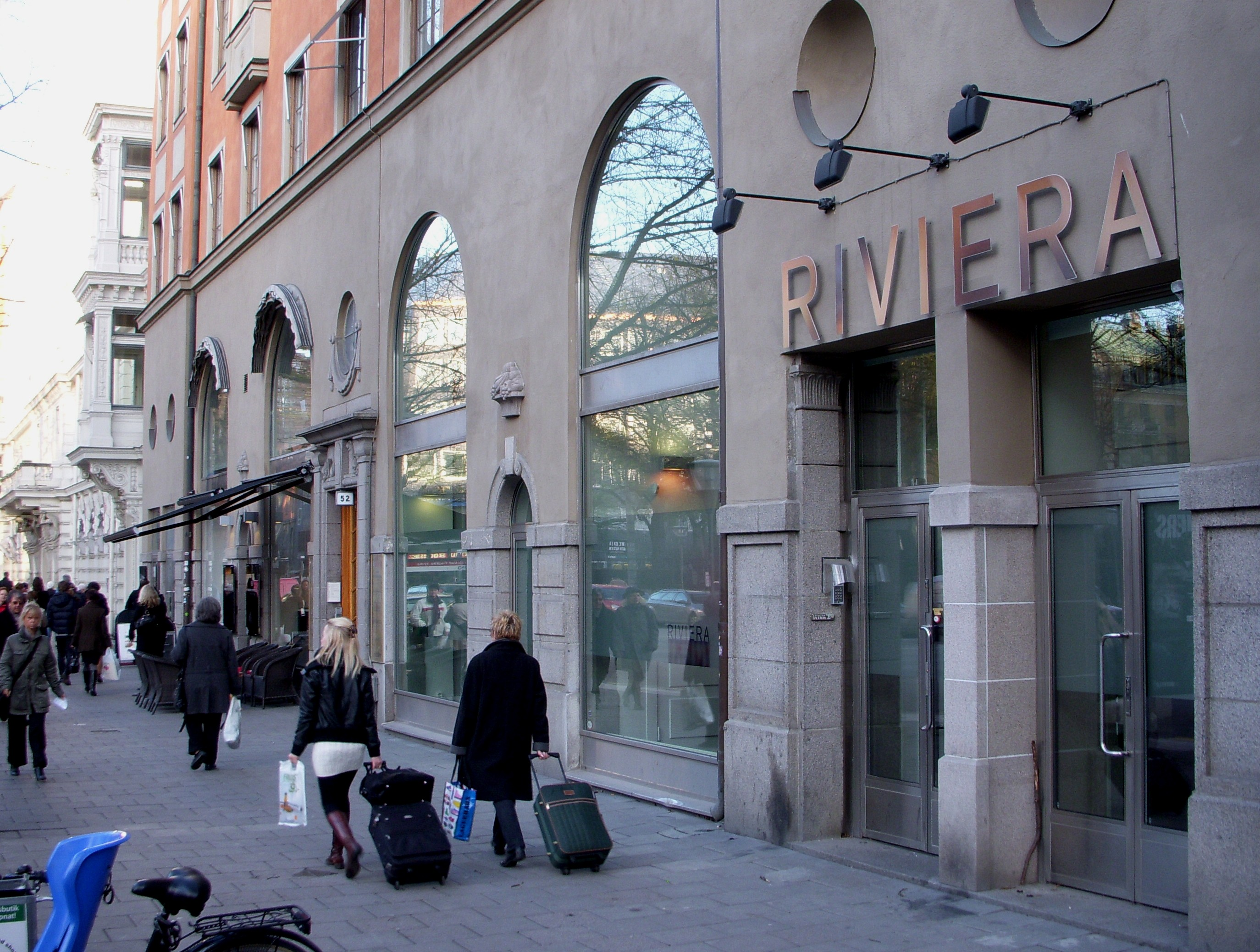 Före detta biografen "Riviera" vid Sveavägen i Stockholm